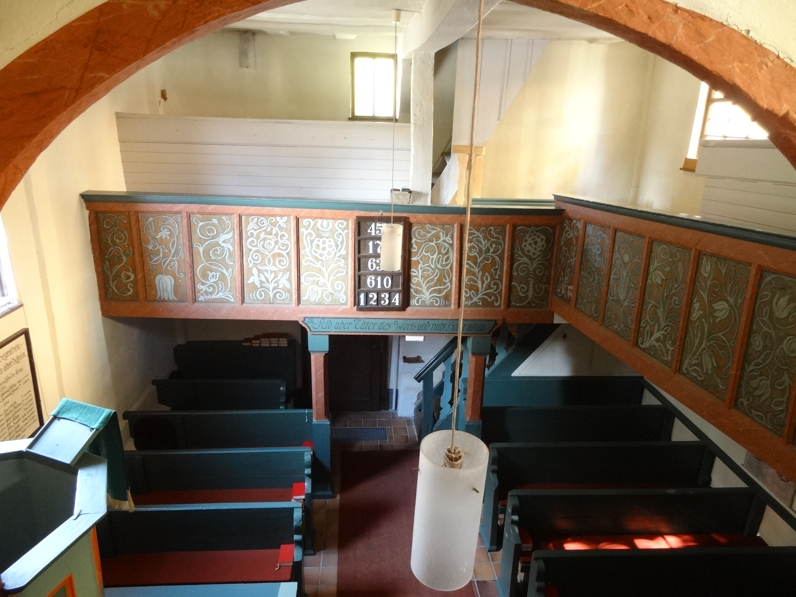 Evangelische Kirche Klein-Eichen